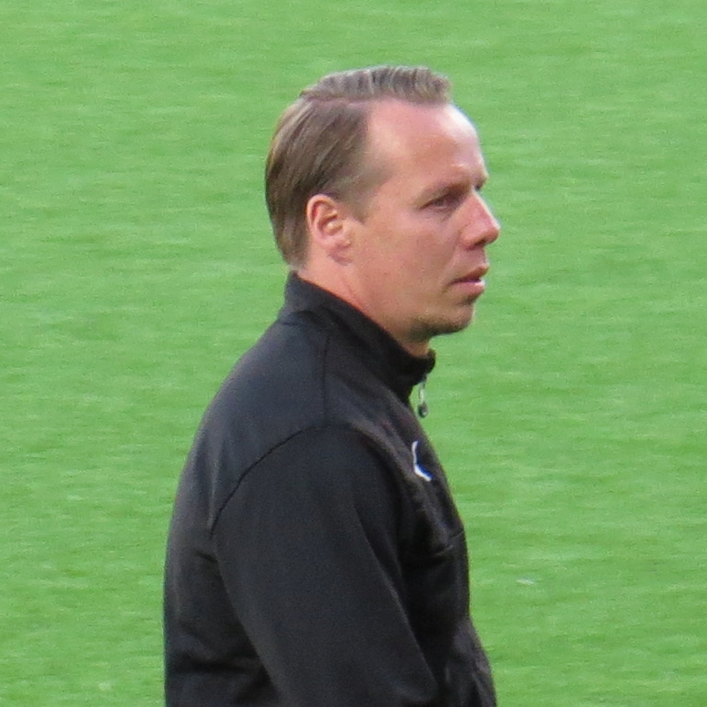 Sami Ristilä, suomalainen jalkapalloilija ja jalkapallovalmentaja FC KTP:n valmentajana kaudella 2015.